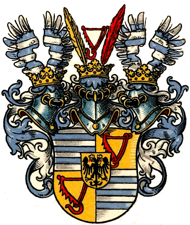 Wappen der Grafen von Heyden (Westfalen)